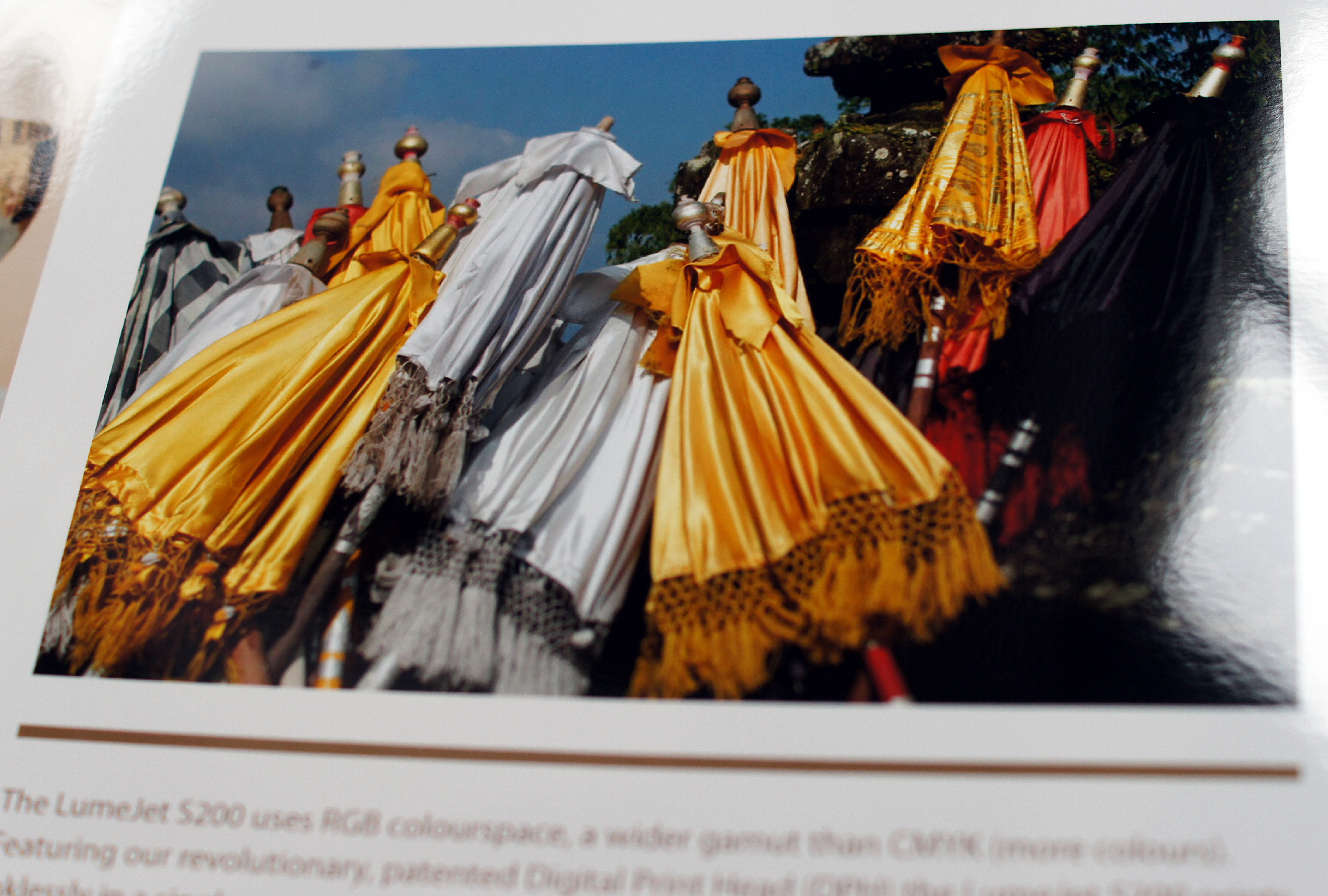 Fast photo-realistic direct imaging from a Lume Jet printer